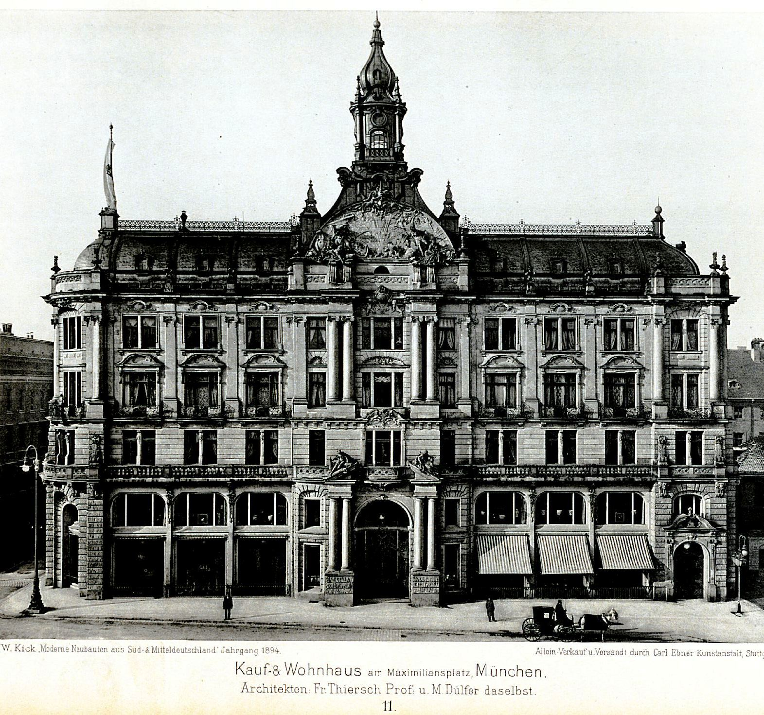 Wohn- und Geschäftshaus Bernheimer-Haus, Lenbachplatz 3 in München, erbaut 1887–1889 nach Entwürfen von Friedrich von Thiersch und Martin Dülfer